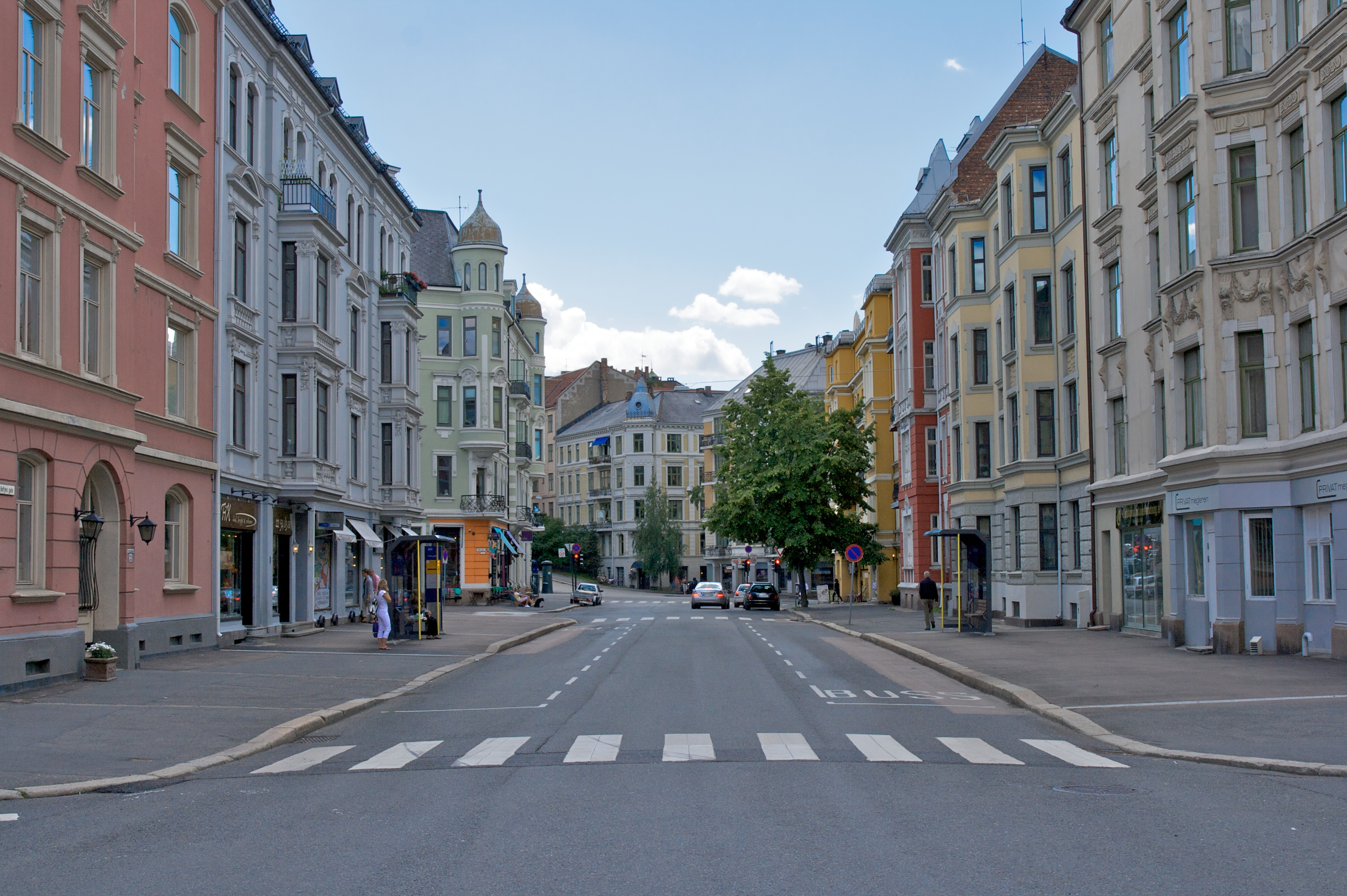 Thomas Heftyes gate, sett fra krysset med Eckerbergs gate. Frogner i Oslo.